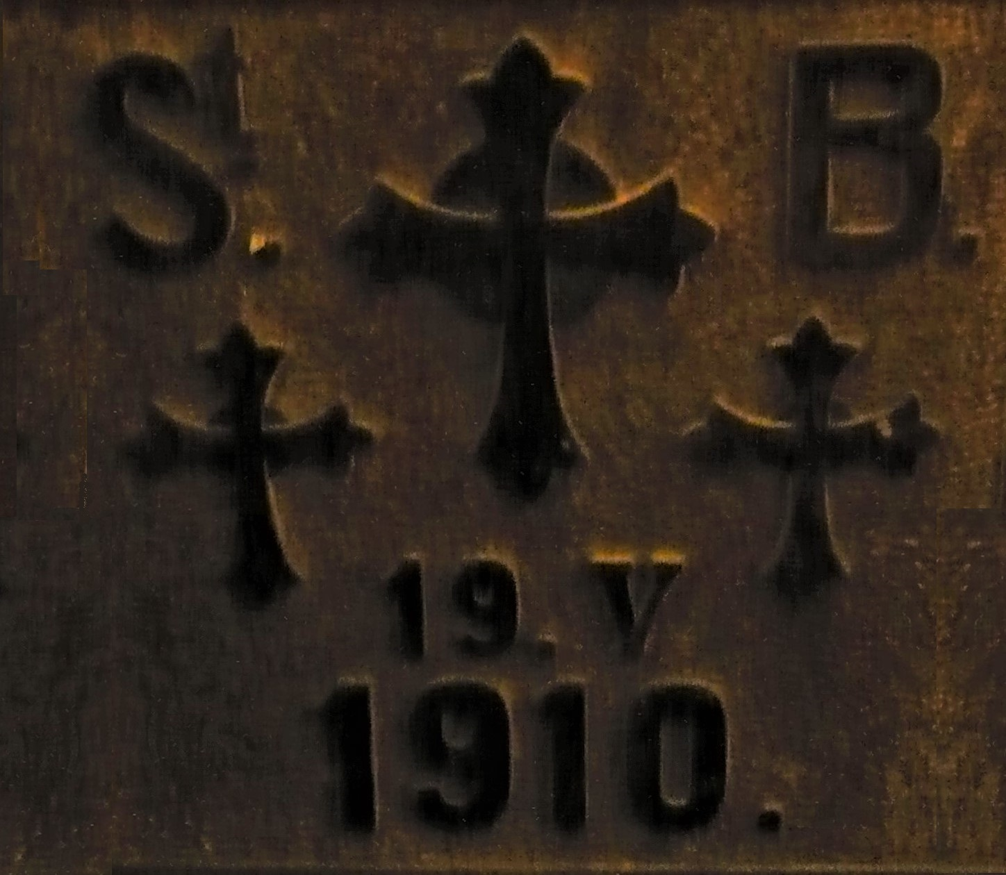 Kościół Barbary w Nowej Rudzie. Kamień węgielny